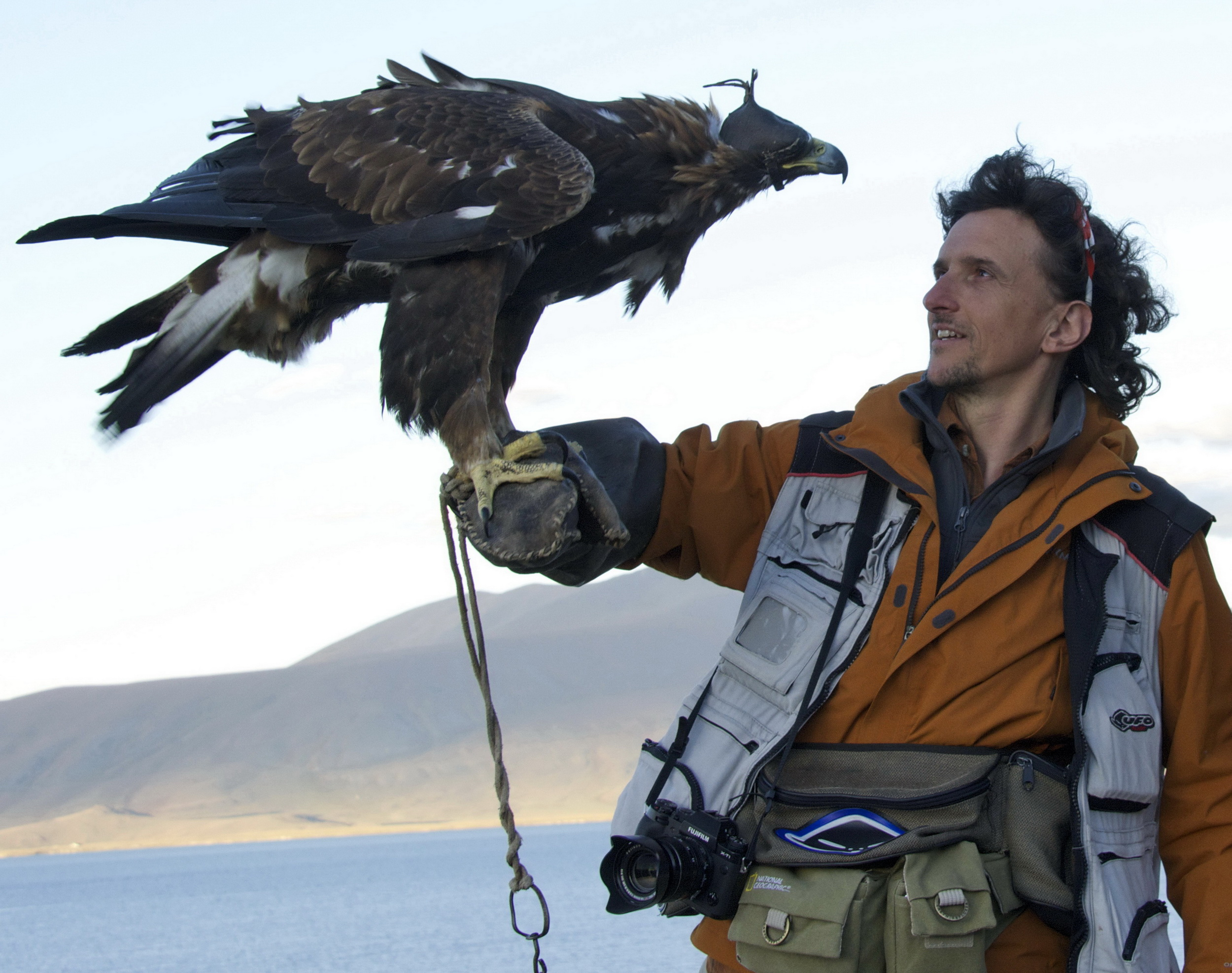 Foto di Luca Bracali